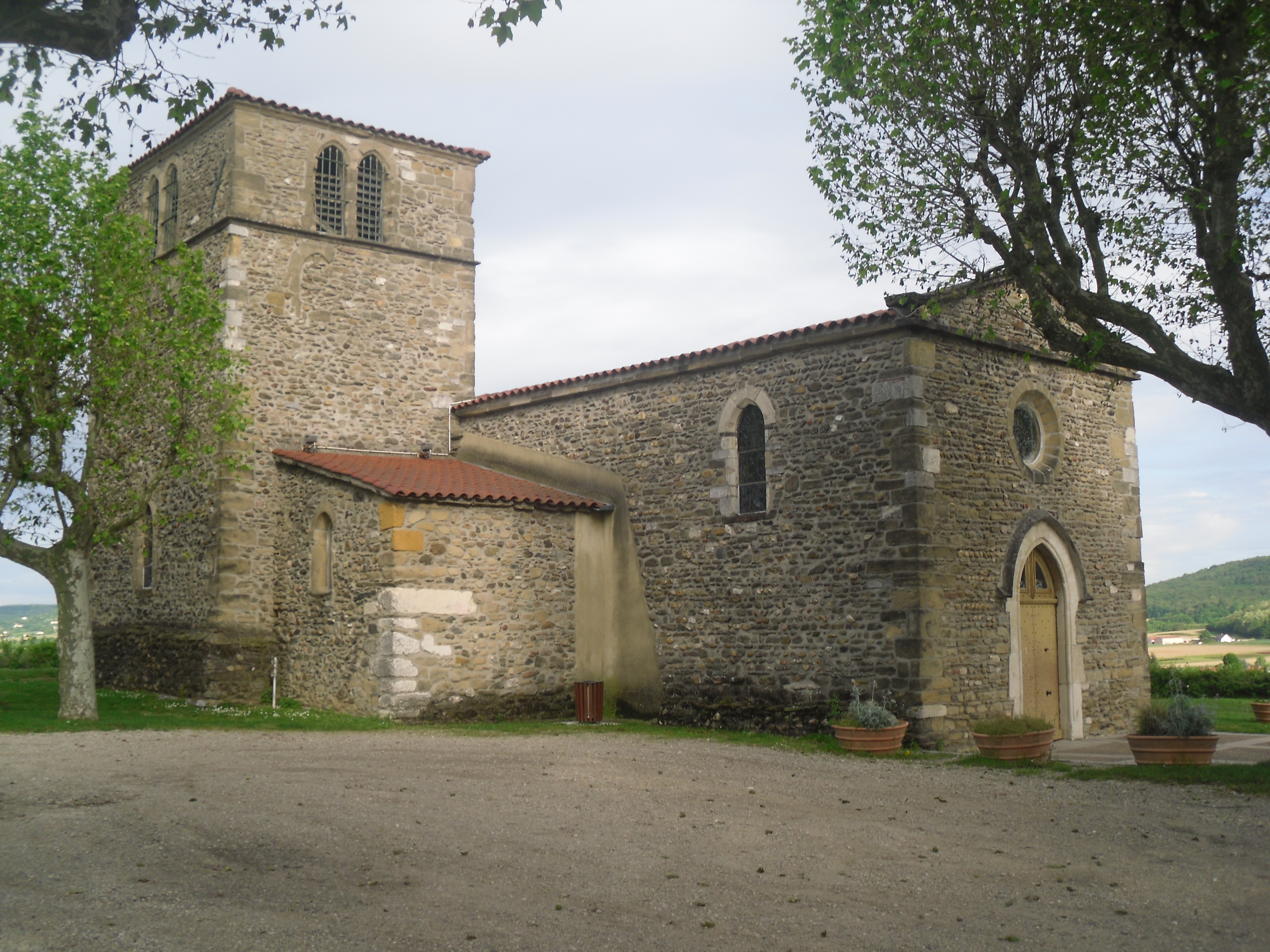 Eglise du village, surplombant celui-ci